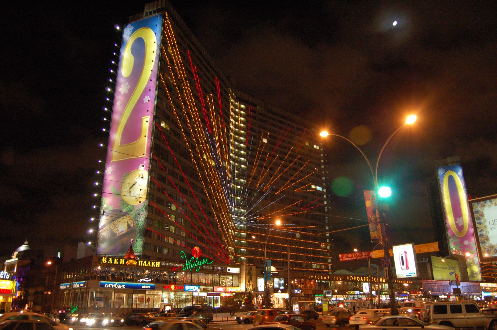 Дом-книжка на Новом Арбате